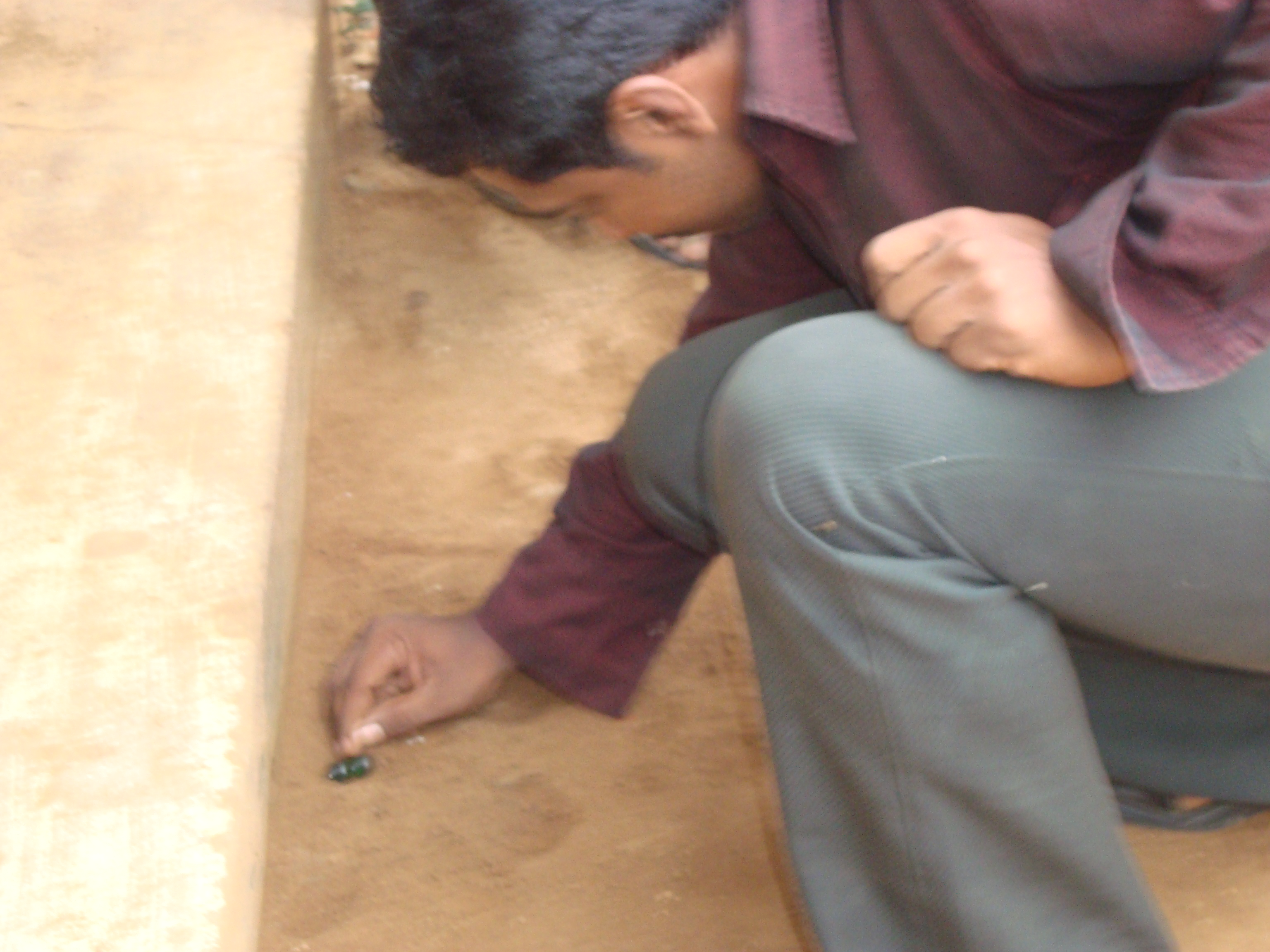 സേവികളിയിൽ മുട്ട് പരിശോധിക്കുന്നു